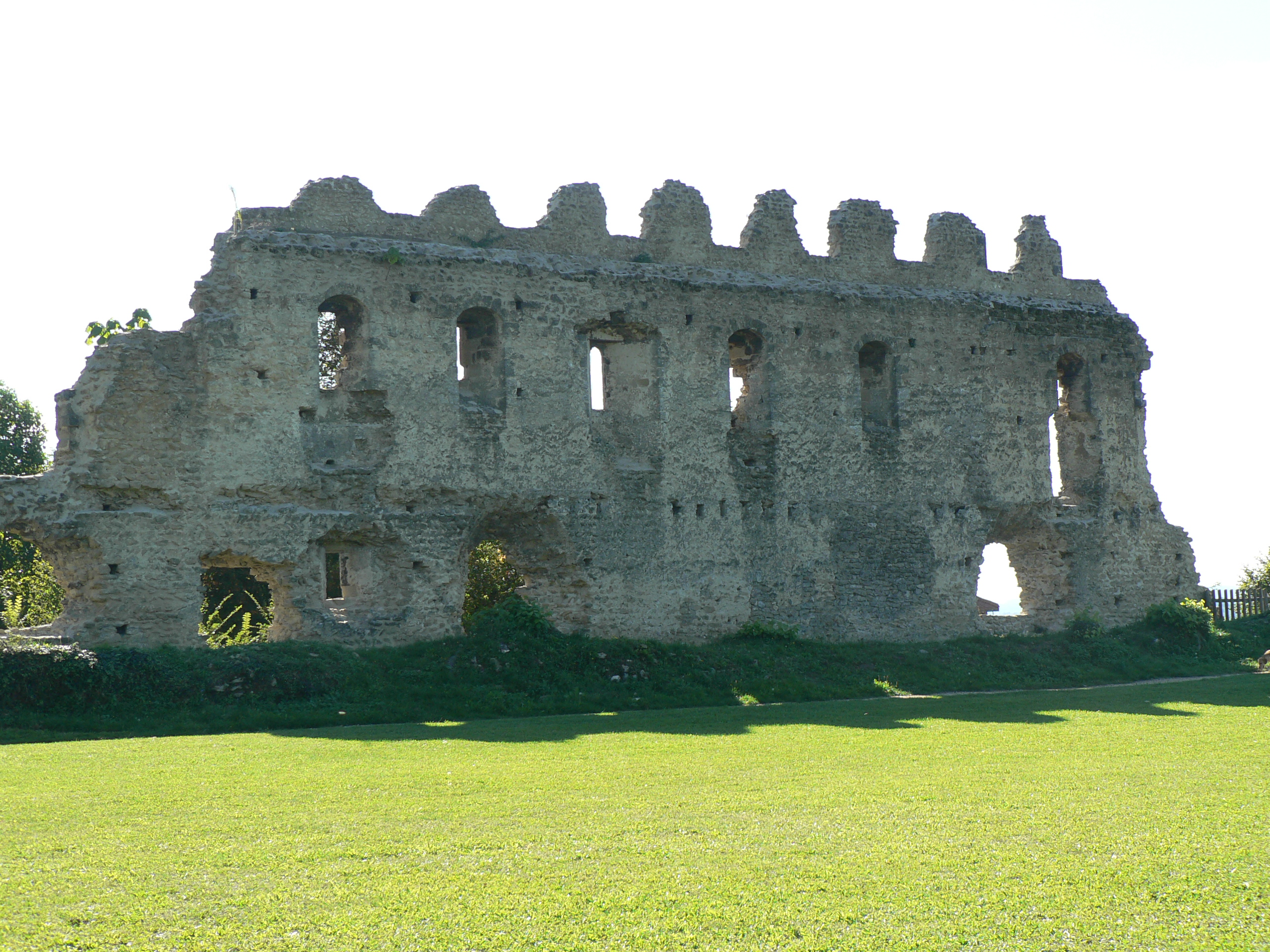 Château de Beauvoir, (Classé, 1922)